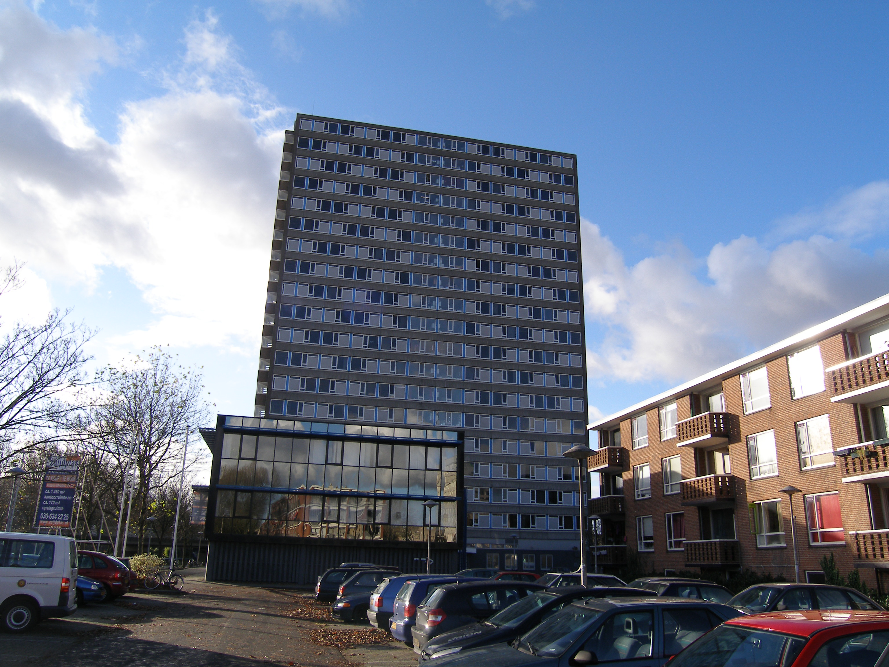 IBB Utrecht